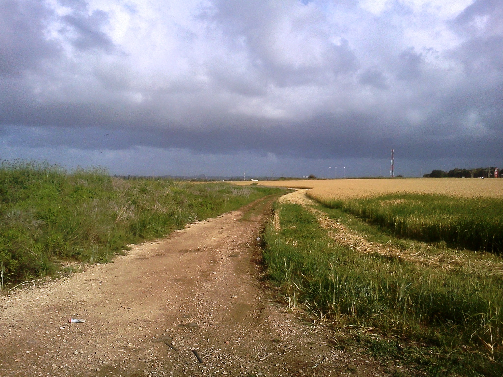 תעלת עינת באביב